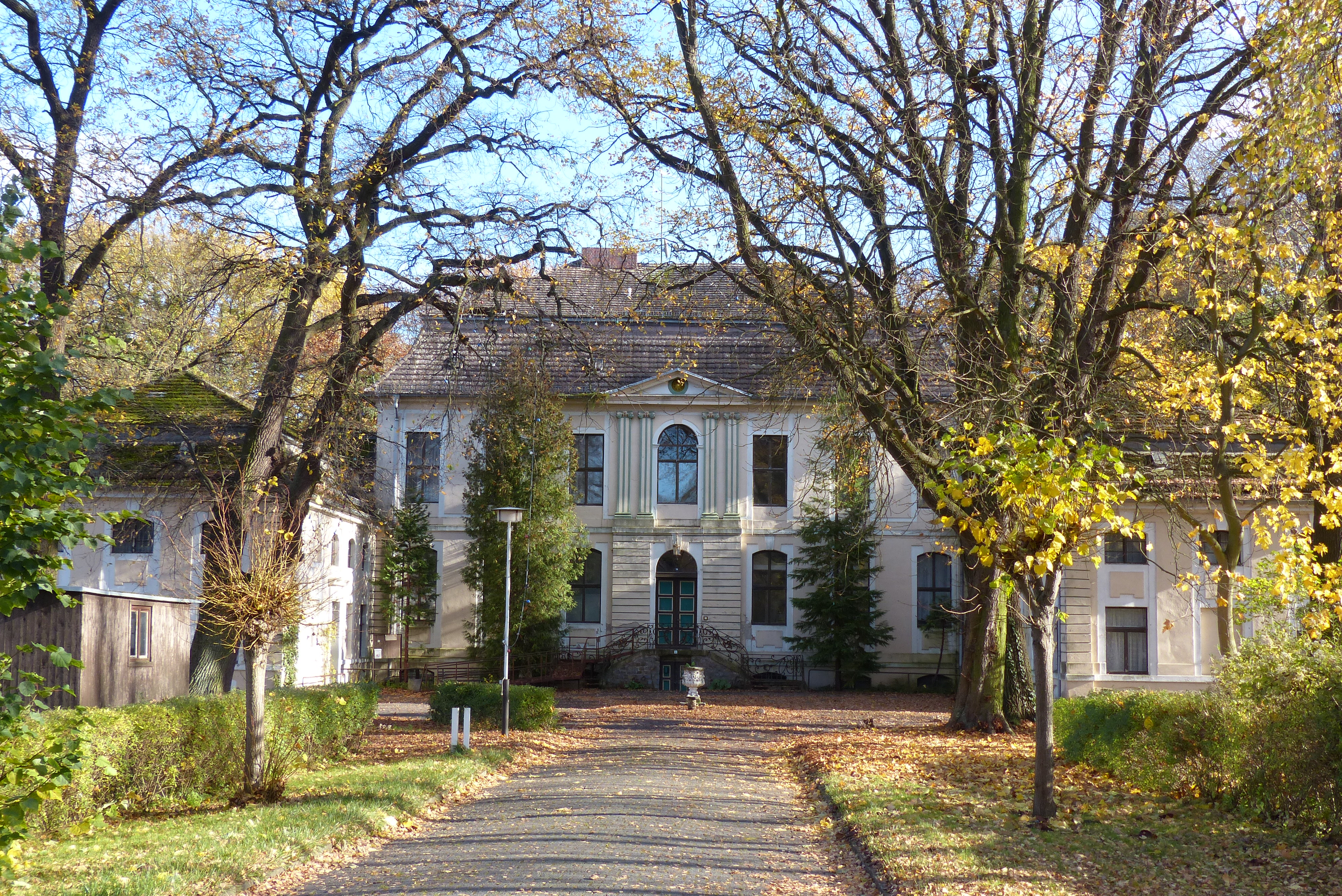 Herbstidylle: buntes Laub an Bäumen und auf der abfallenden Einfahrt zieren die Schlossfassade